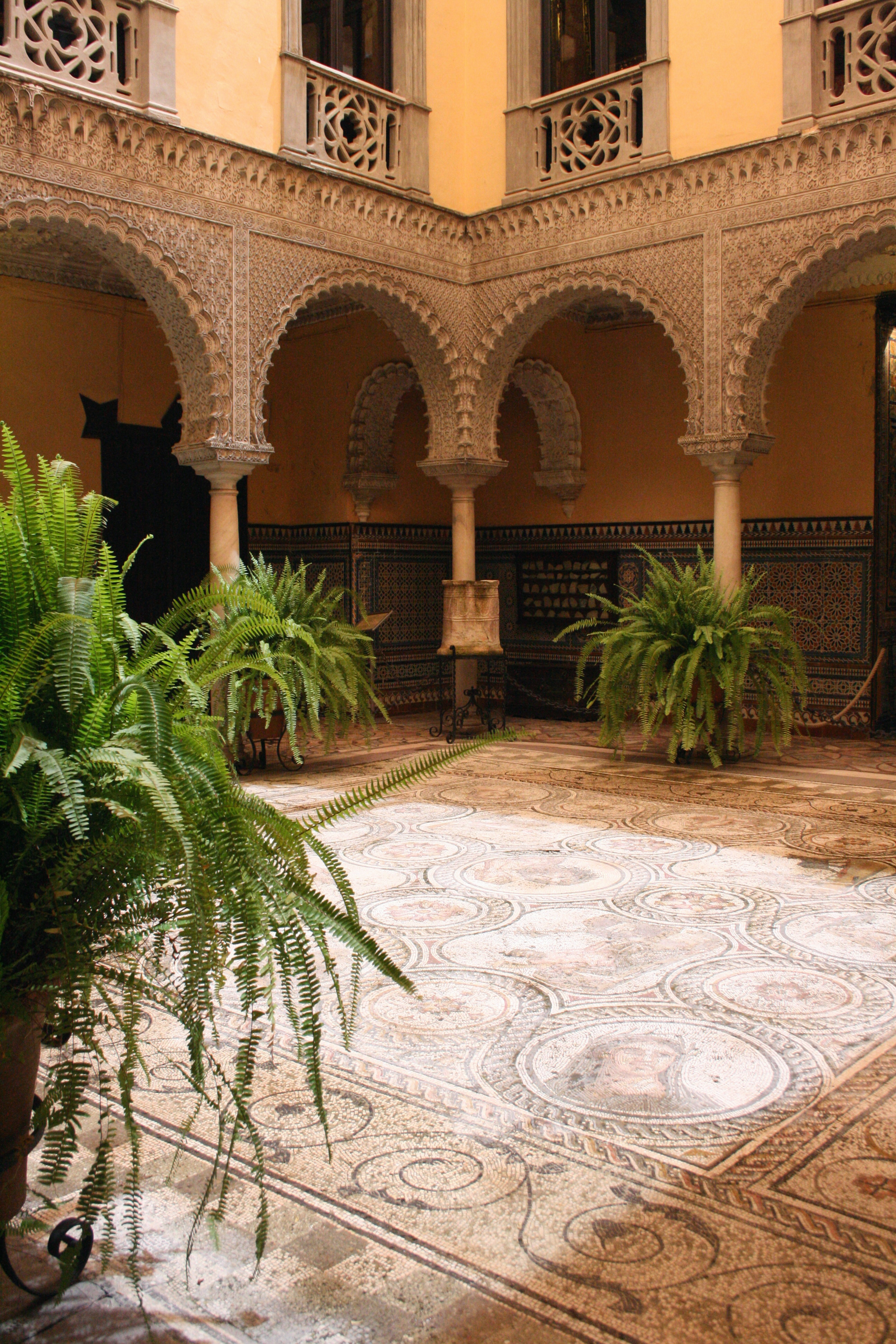 Palacio de la Condesa de Lebrija, Calle Cuna 8, Séville, Espagne